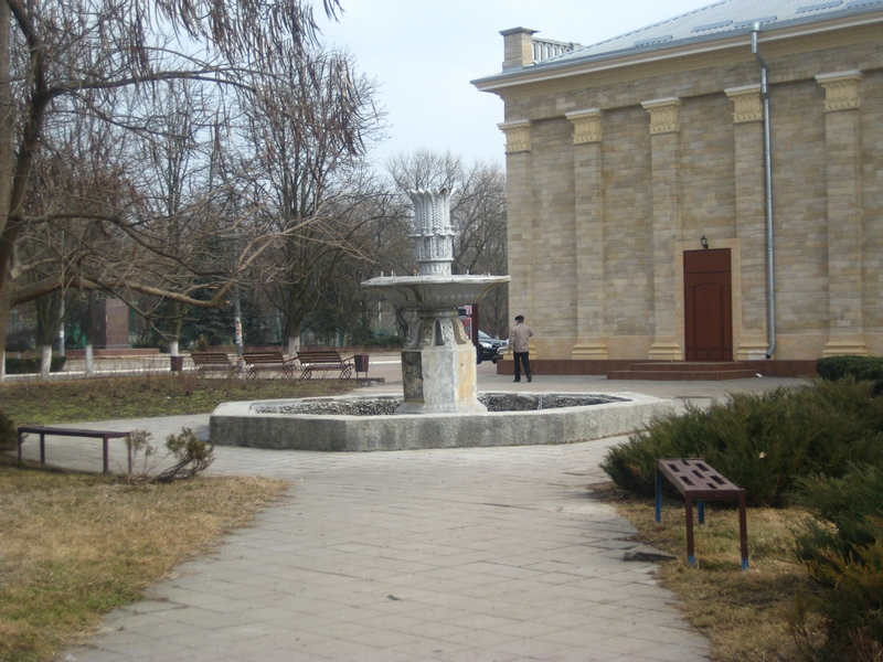 На этом месте располагался деревянный "Бомонд"